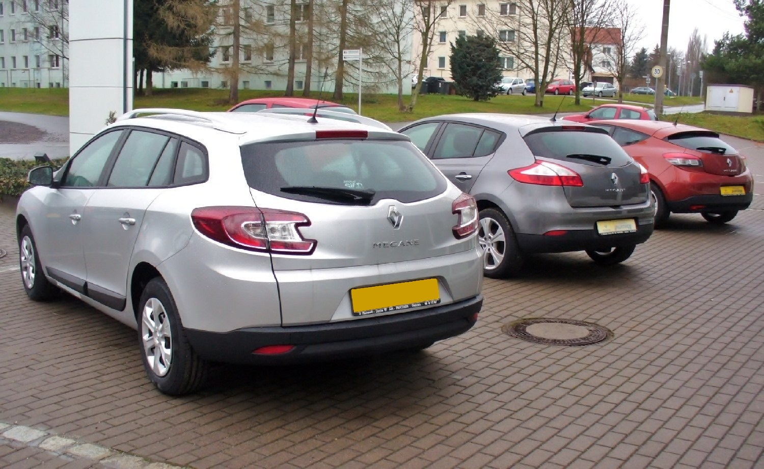 Renault Mégane Karosserievarianten